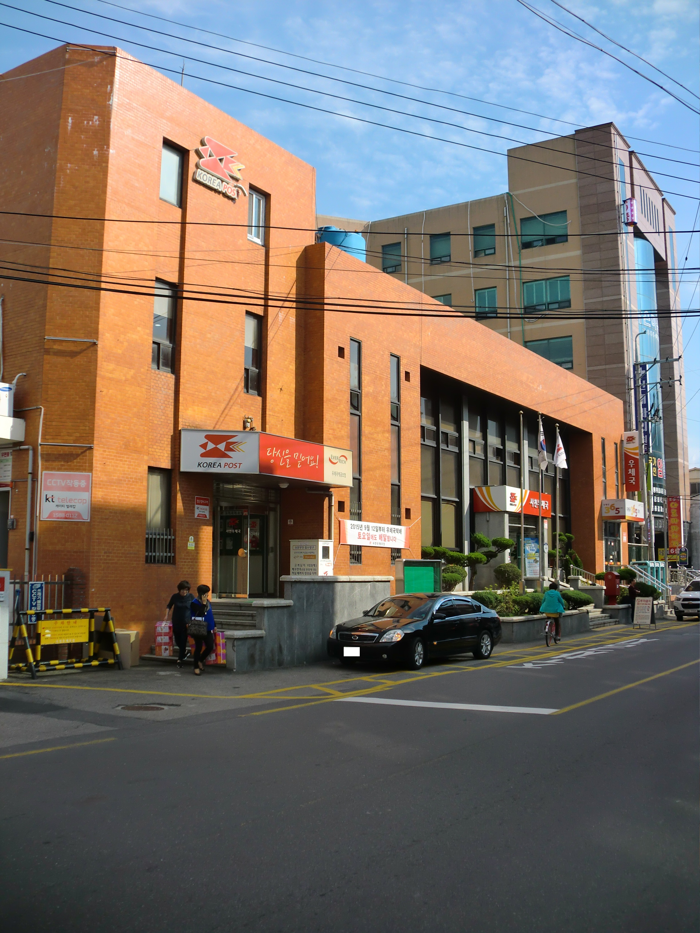 경상남도 사천시에 있는 사천우체국